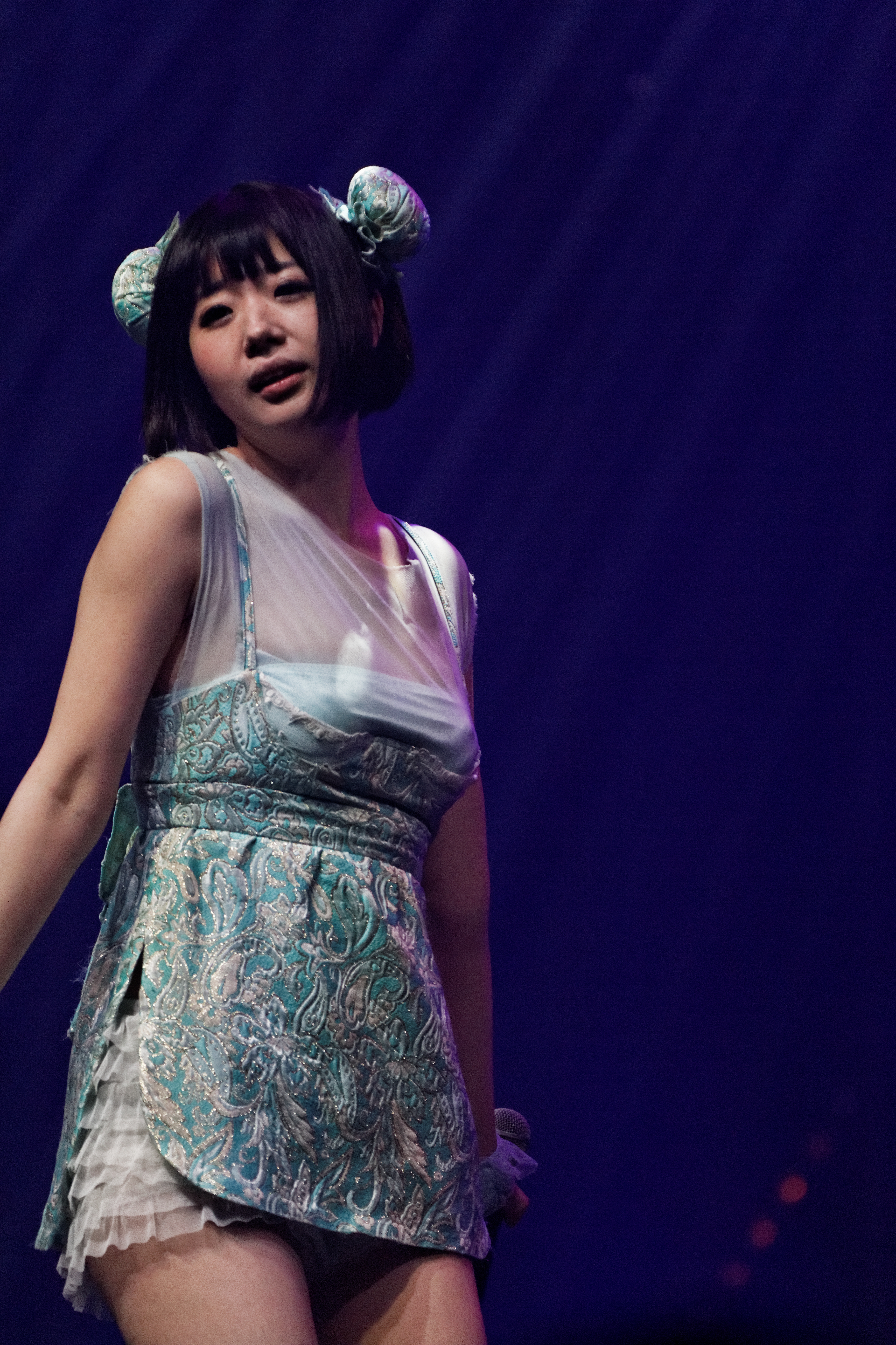 Dempagumi.inc en concert lors du live house du Japan expo Paris 2013.